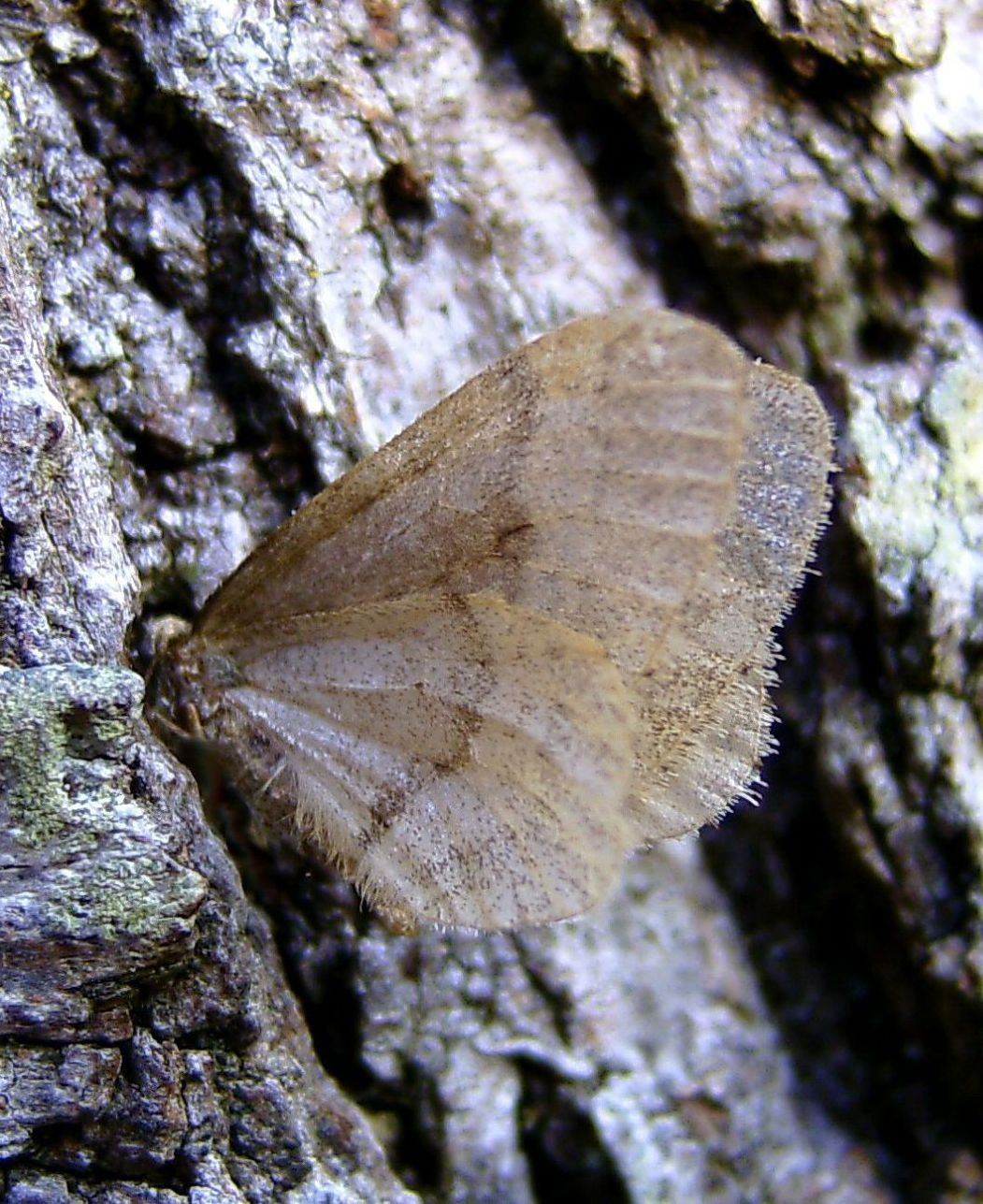 Buchen-Frostspanner (Operophtera fagata), 19.12 2016, Frankfurt am Main